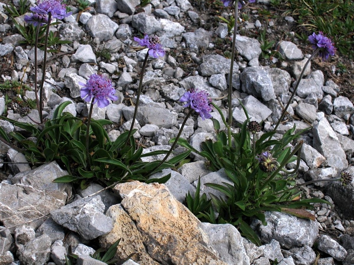 lepničevolistni grintavec na Malem Snežniku.